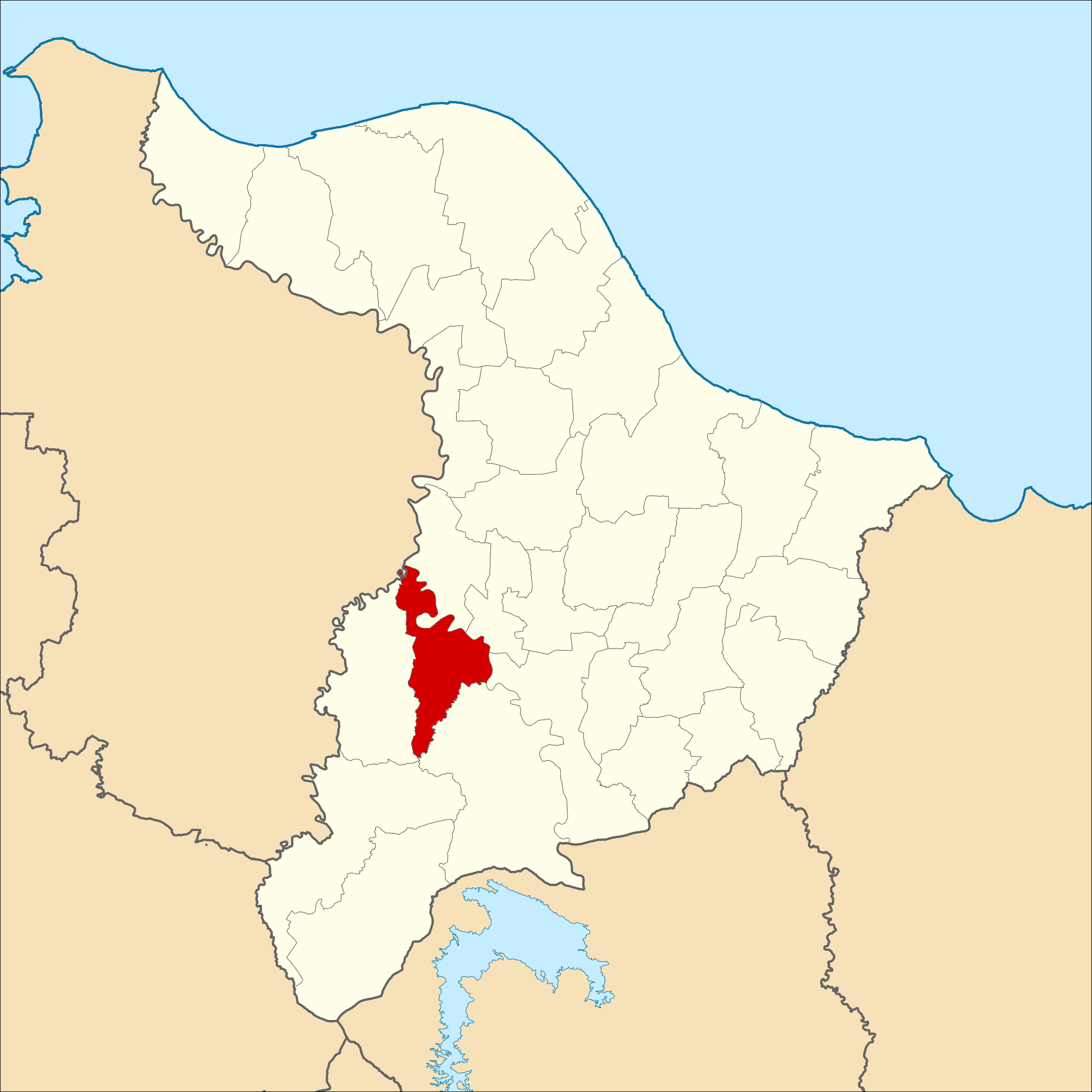 Peta Lokasi Kecamatan Telukjambe Timur, Kabupaten Karawang, Indonesia